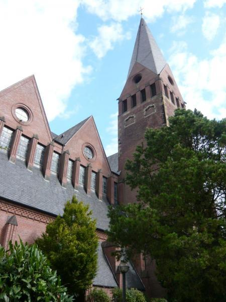 Kath. Pfarrkirche St. Antonius Kevelaer